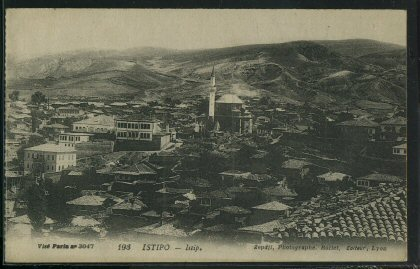 Штоп во почетокот на ХХ век